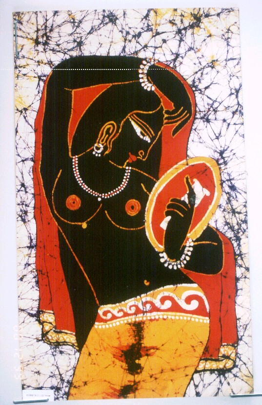 Obraz wykonany na płótnie bawełnianym techniką batiku, przedstawiający kobietę z lustrem. Postać widoczna do połowy uda, w ujęciu en face, z głową z prawego profilu. W lewej ręce trzyma owalne lustro na wysokości piersi, prawą unosi nad głową, malując jednym palcem znak bindu na czole. Kobieta ubrana jest w wąskie spodnie. Obraz wzorowany na płaskorzeźbie ze świątyni w Khadźuraho.